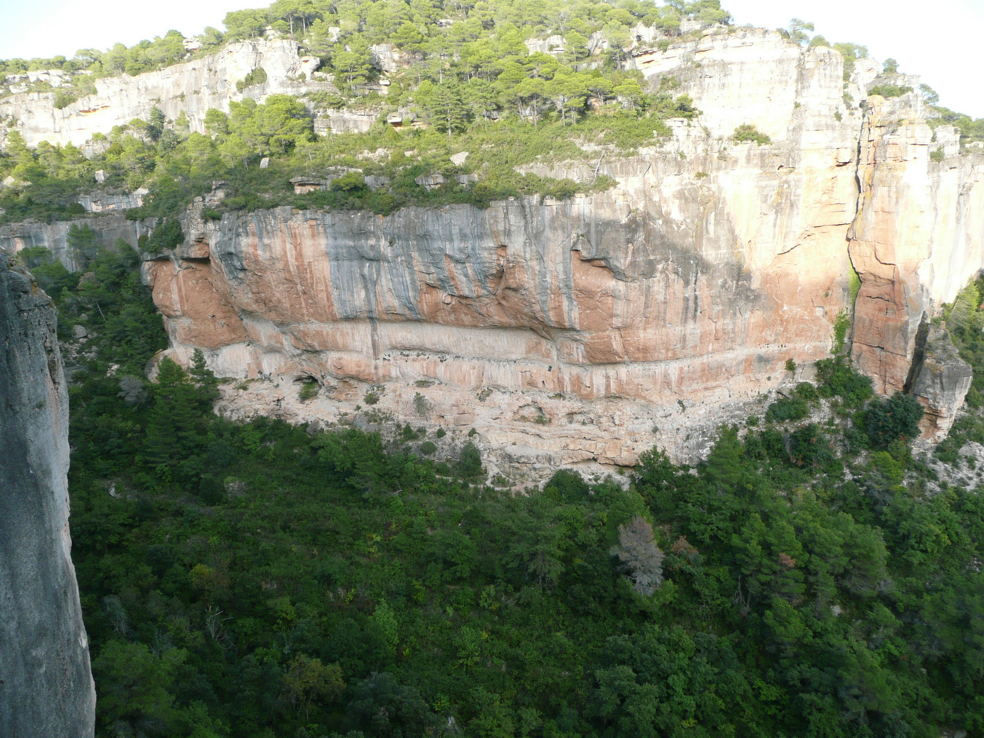 Falaise de Siurana, secteur El Pati, où se trouve La Rambla, 9a+